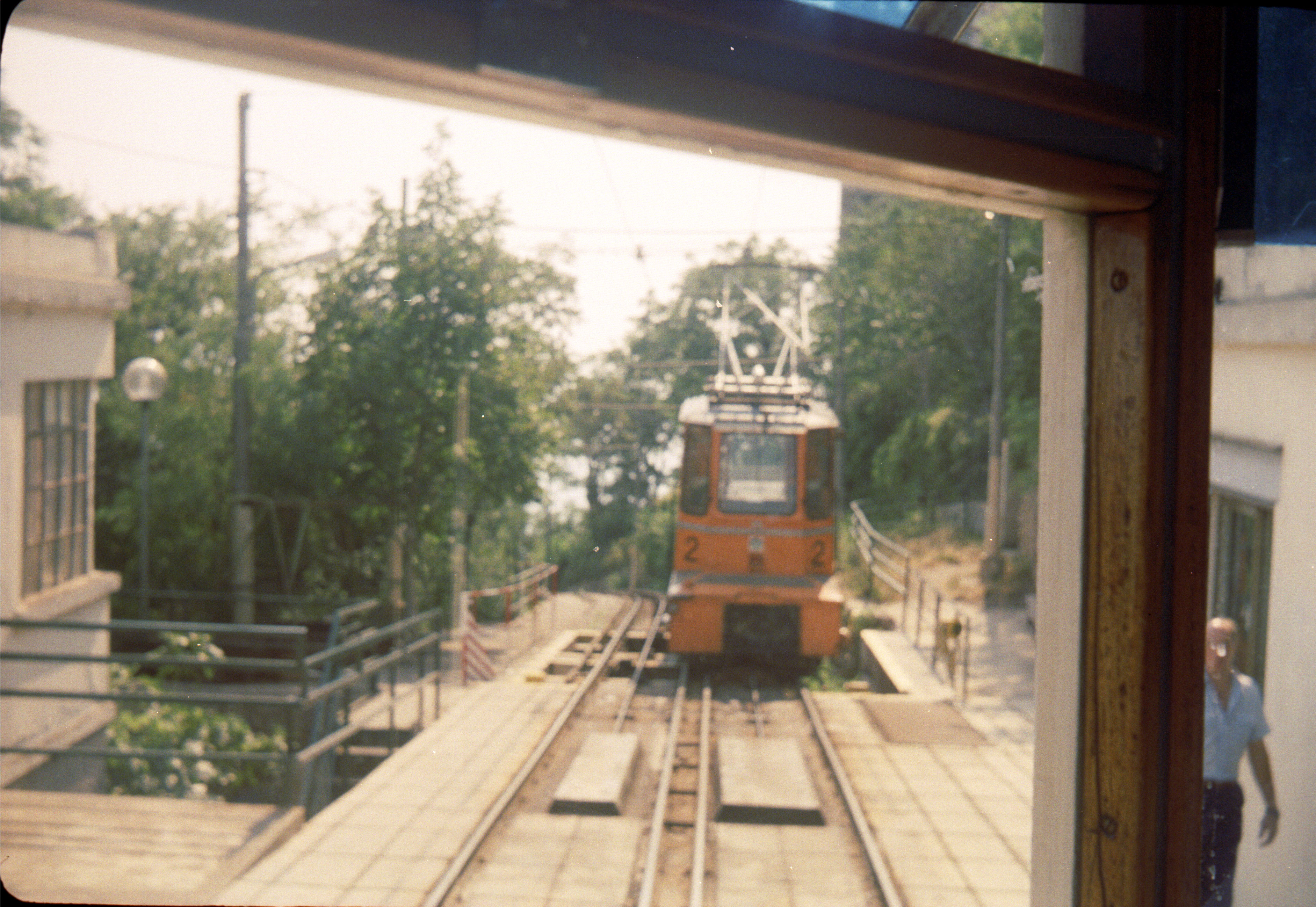 Approach of Cable Tractor by Opcina Tram